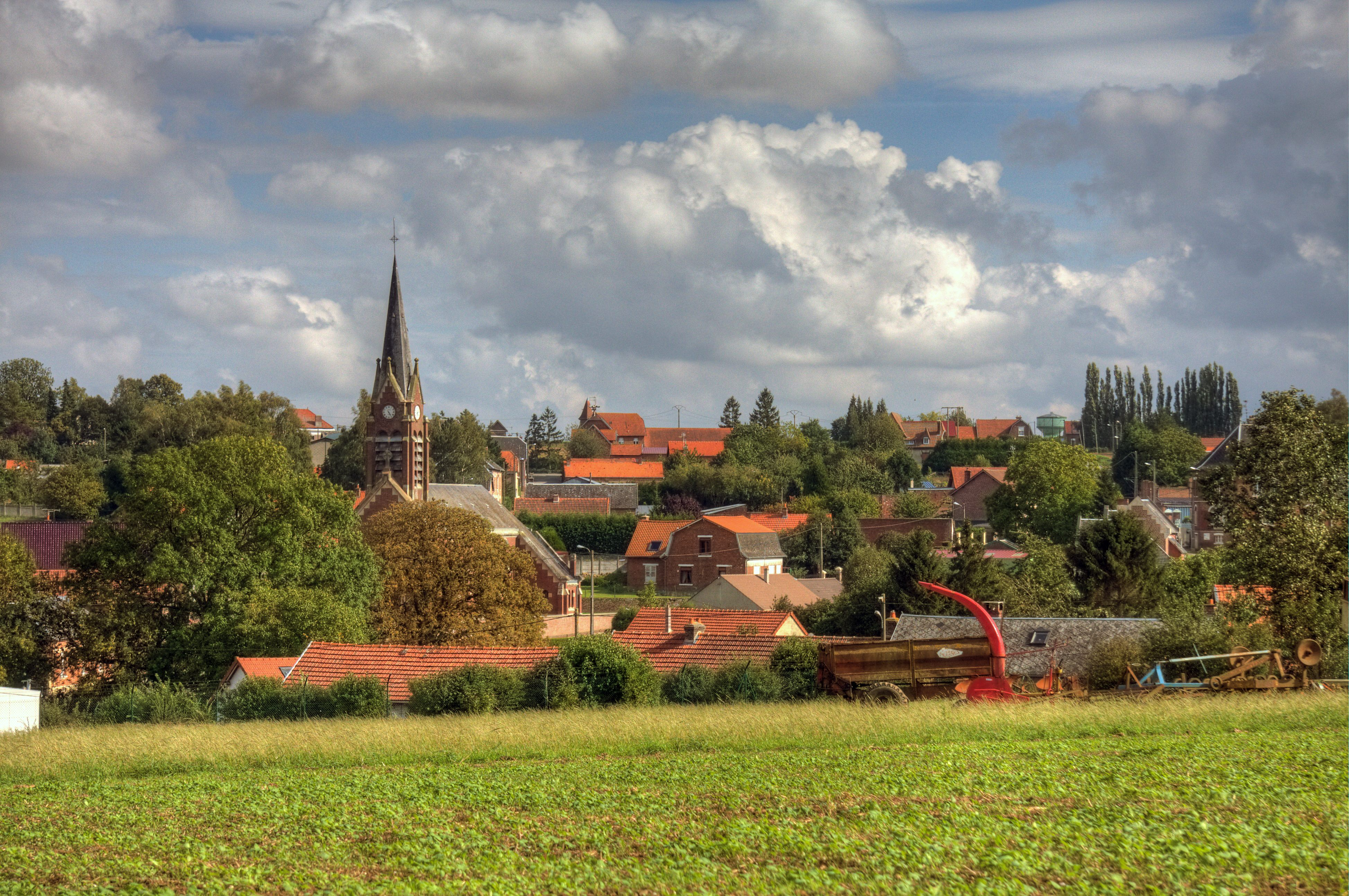 Vue générale de Trescault